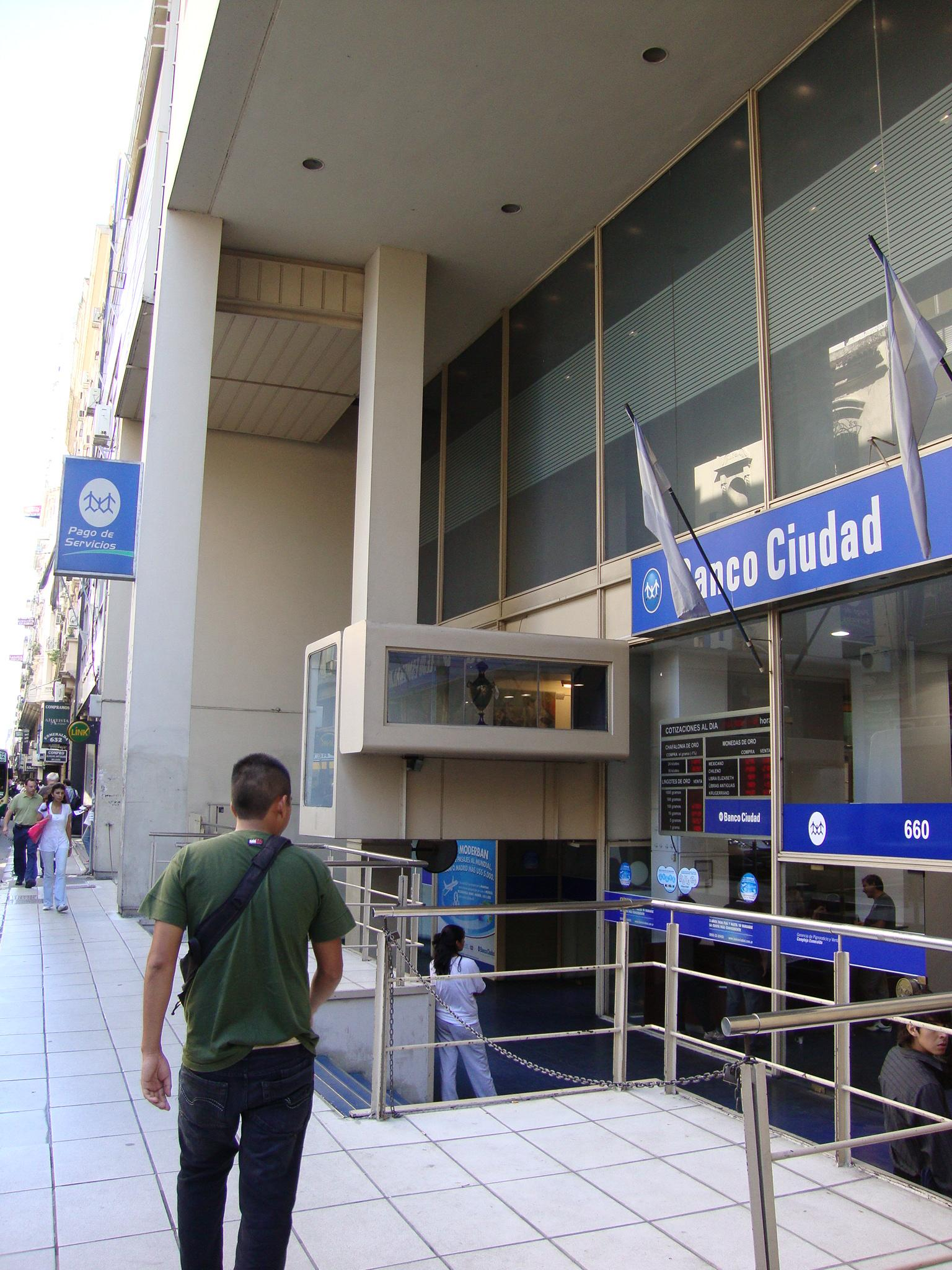 La entrada del Edificio Ventas del Banco de la Ciudad de Buenos Aires, también llamado "Complejo Esmeralda". Se encuentra en la calle Esmeralda 660. Construido en 1939, fue totalmente remodelado en 1968. Buenos Aires, Argentina.